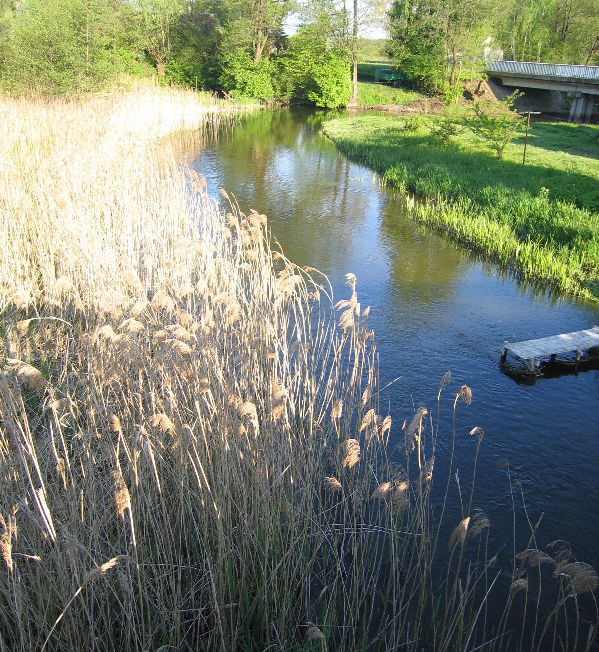 Nieda